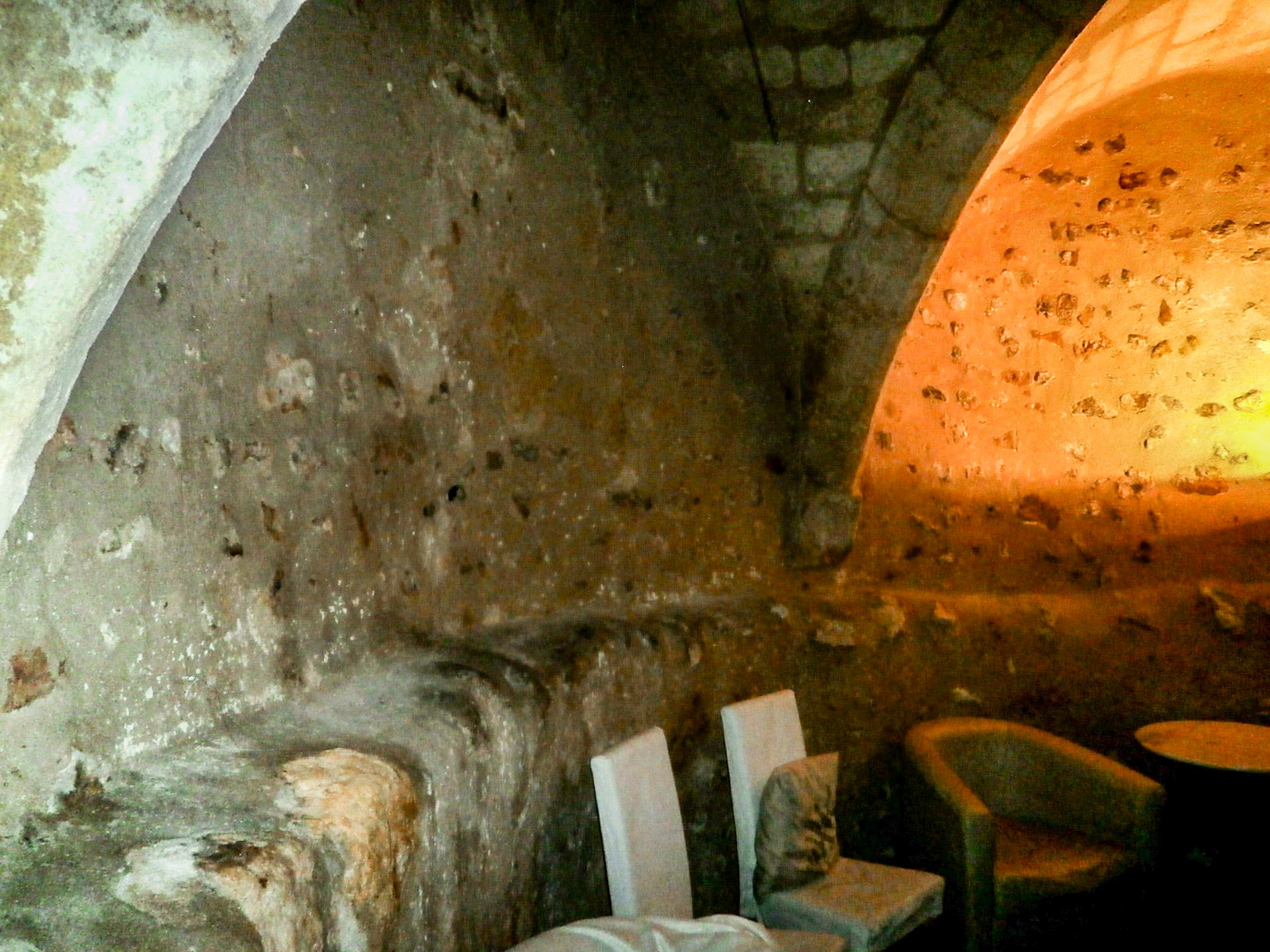 Tour d'enceinte de Châteauneuf réaménagée en cave.